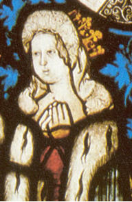 Beatrix Norimberská